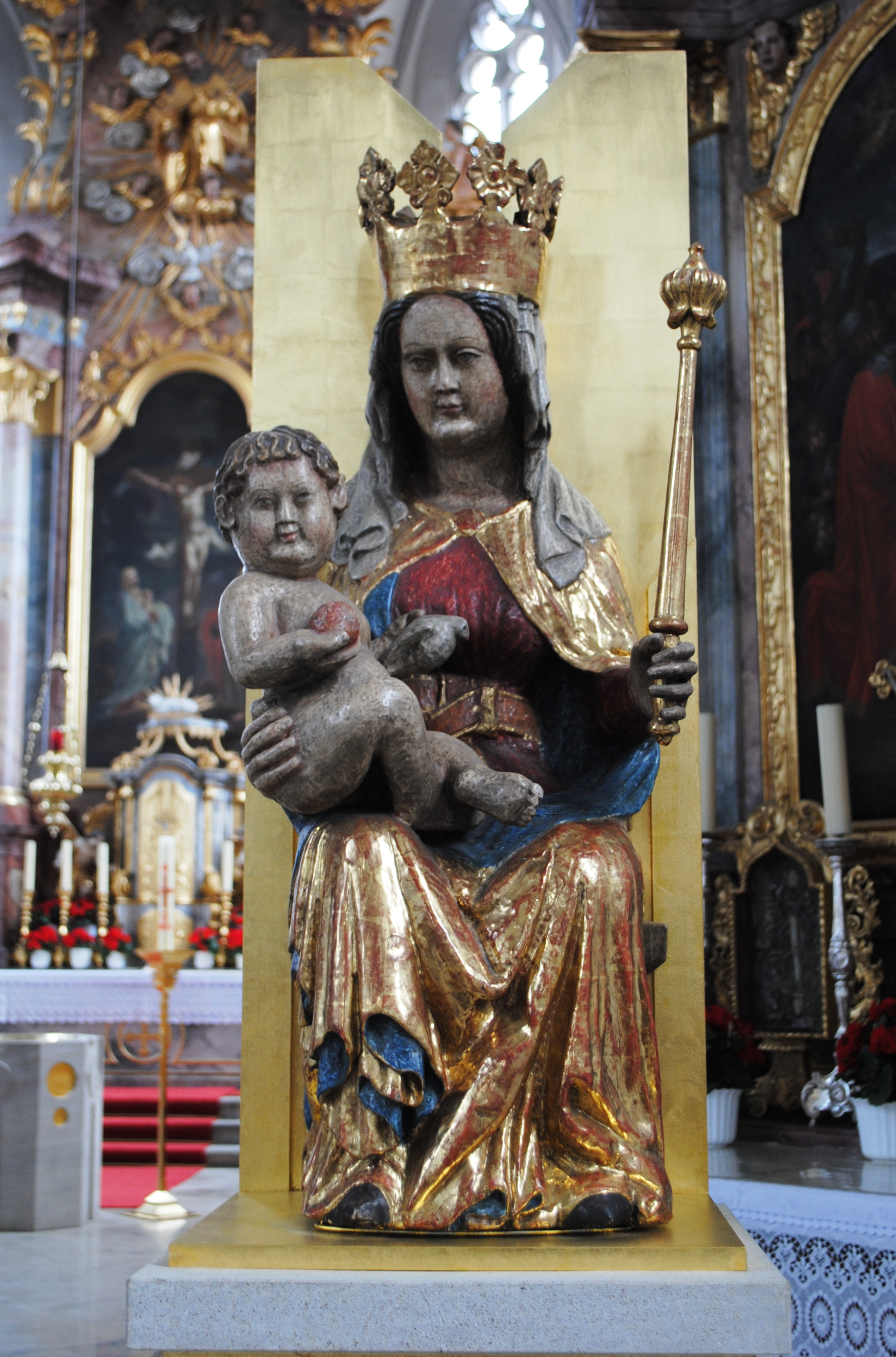 Madonna, Hl. Kreuzkirche, Stadtschwarzach